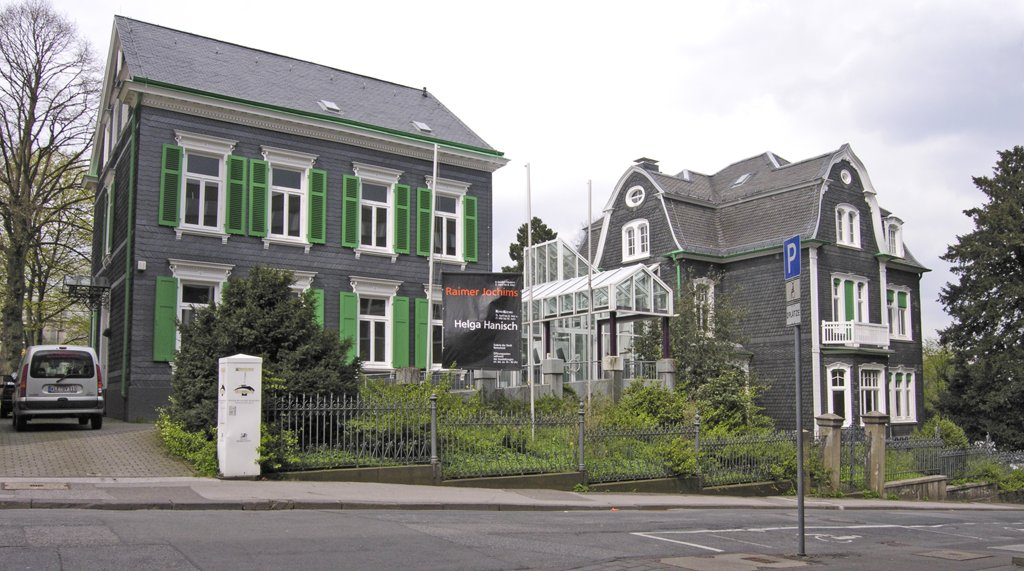 Remscheid, Städtische Galerie